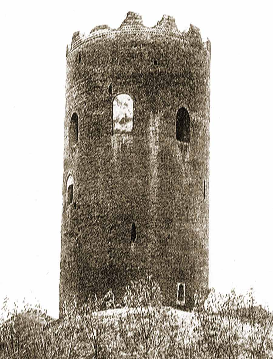 Беларуская (тарашкевіца): Камянецкая вежа